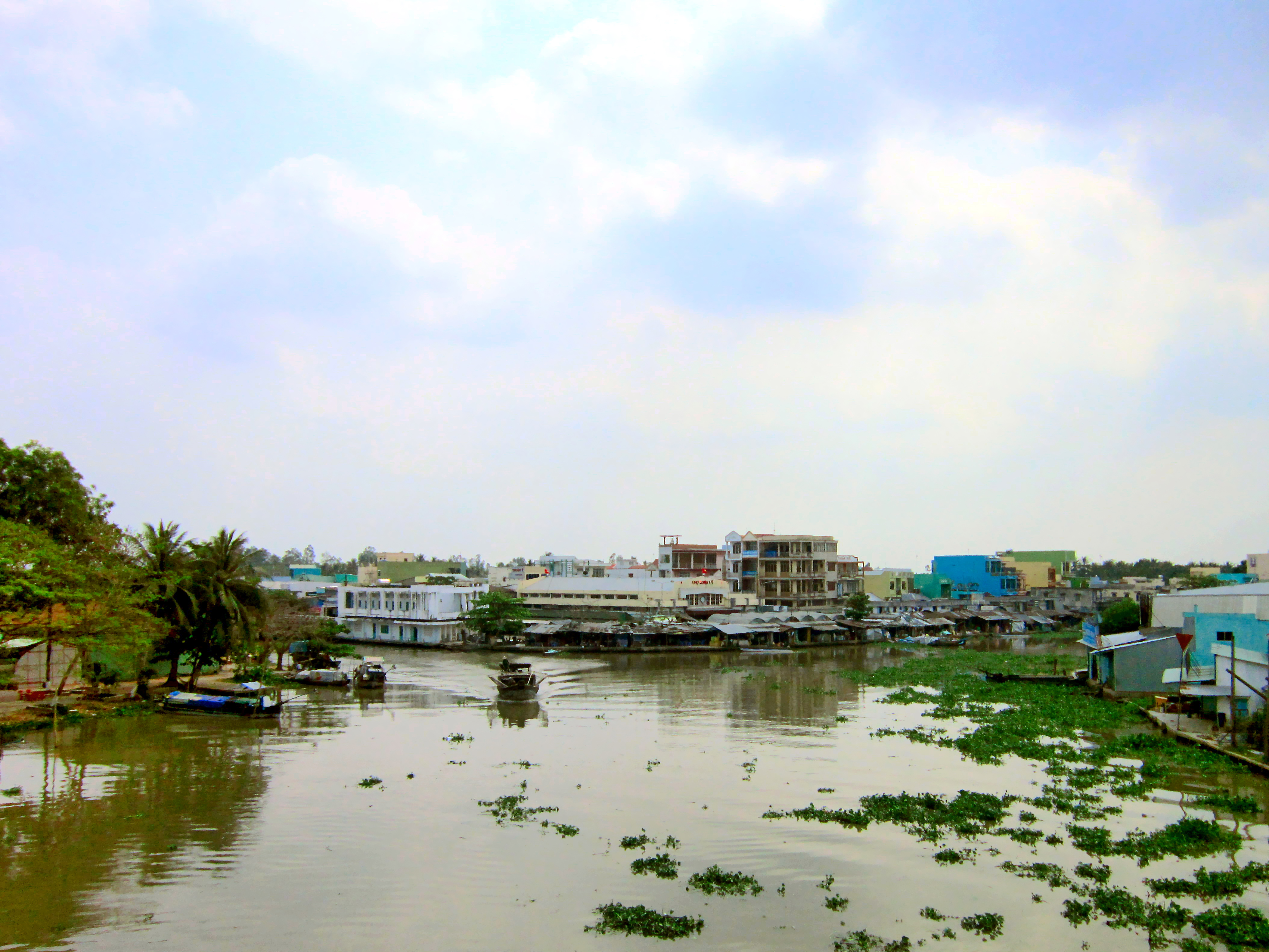 Chợ thị trấn Long Mỹ bên sông Nước Đục, thuộc huyện Long Mỹ, tỉnh Hậu Giang, Việt Nam.